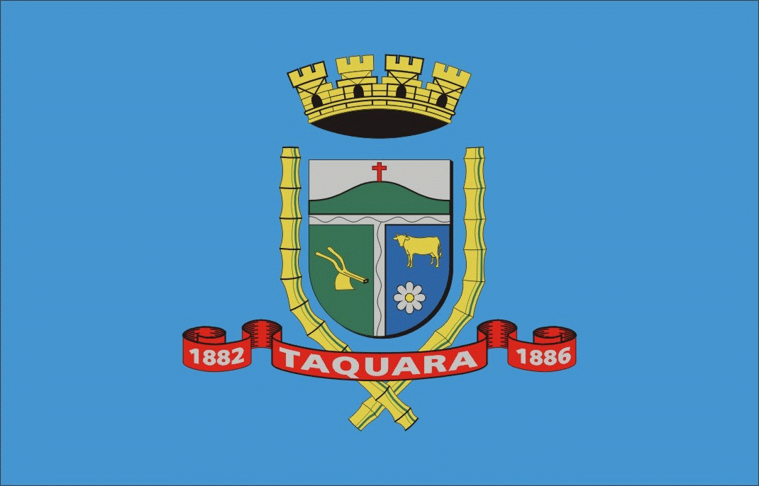 Flag of Taquara, Rio Grande do Sul, Brasil.